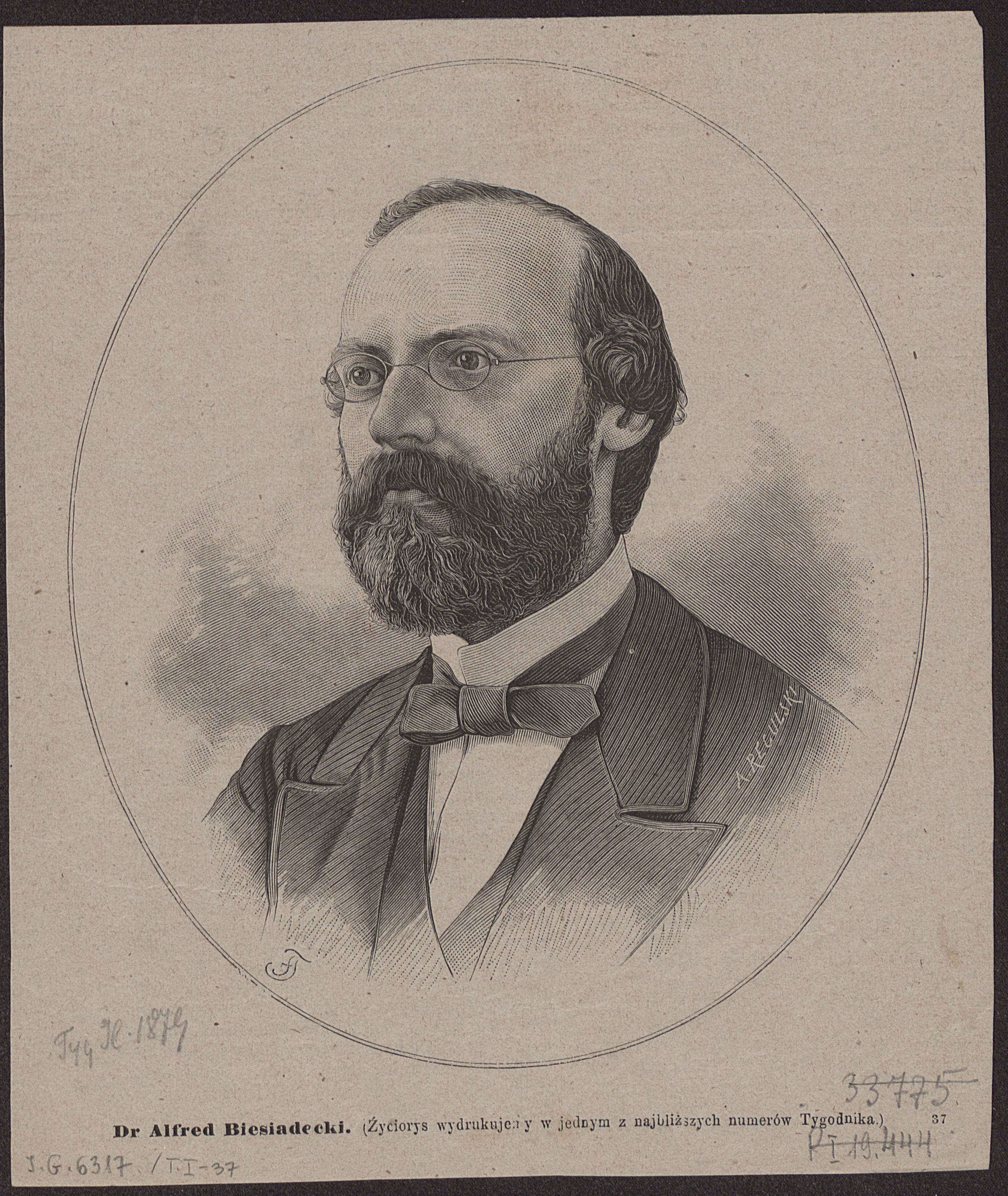 Alfred Biesiadecki, 1879 r.